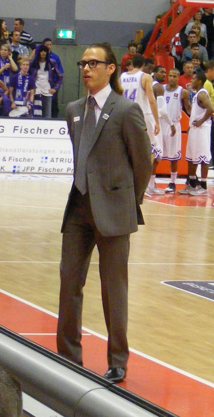 Björn Harmsen (Trainer LTi Giessen 46ers) am 29.10.2011 beim Bundesliga-Basketball-Heim-Spiel gegen Göttingen